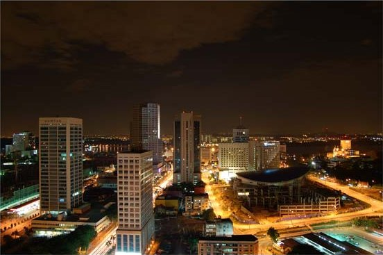 JOHOR BAHRU NIGHT VIEW